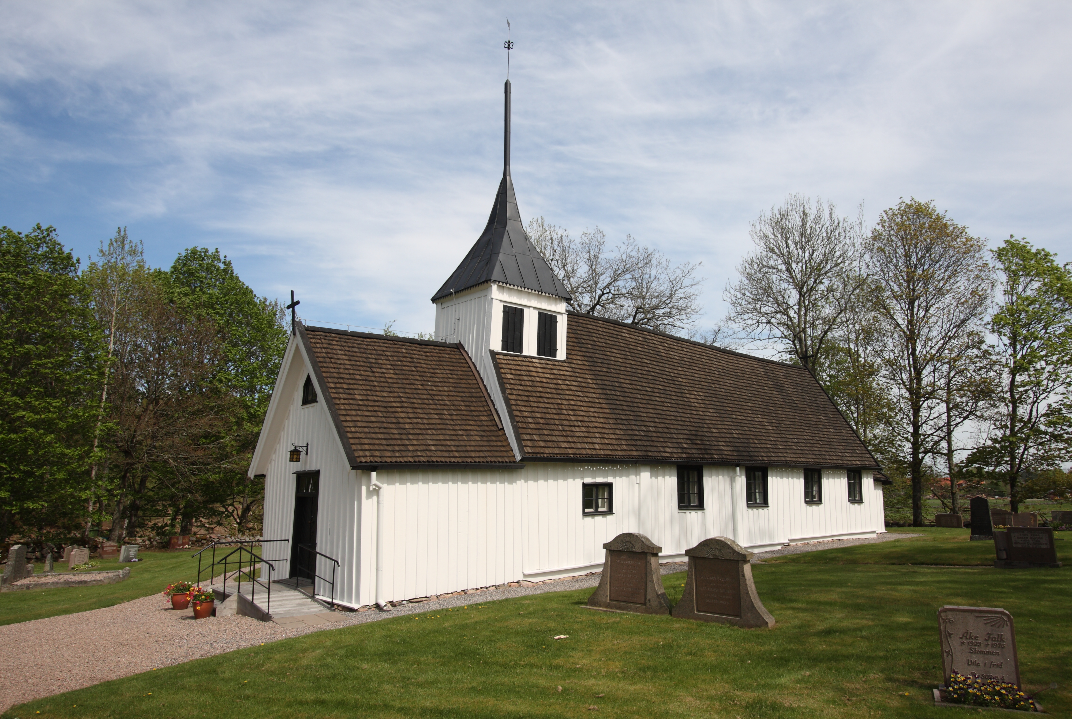 Jällby kyrka.